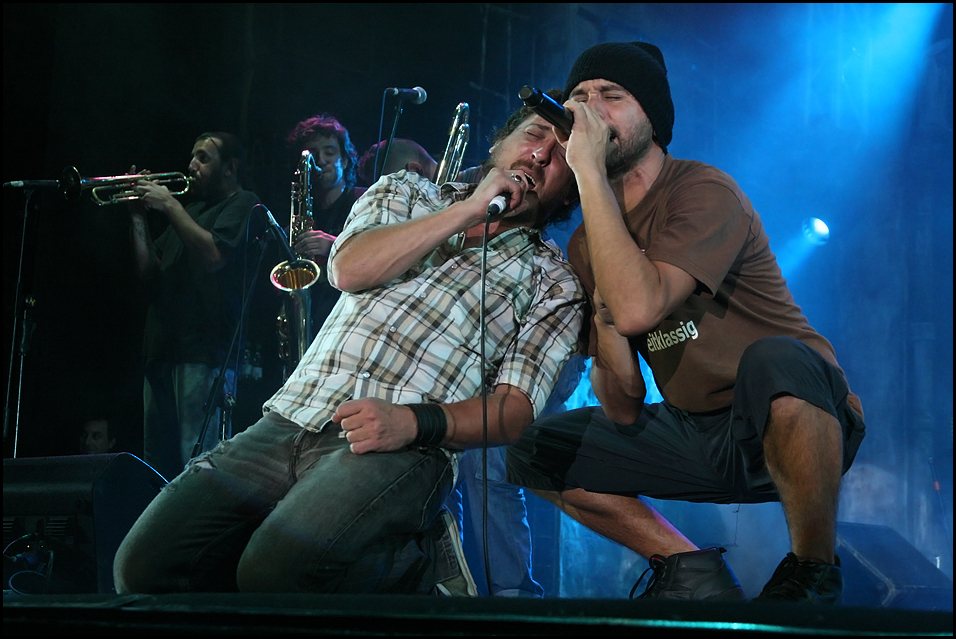 La Vela Puerca, segundo día de presentación en el Teatro de Verano, Montevideo.